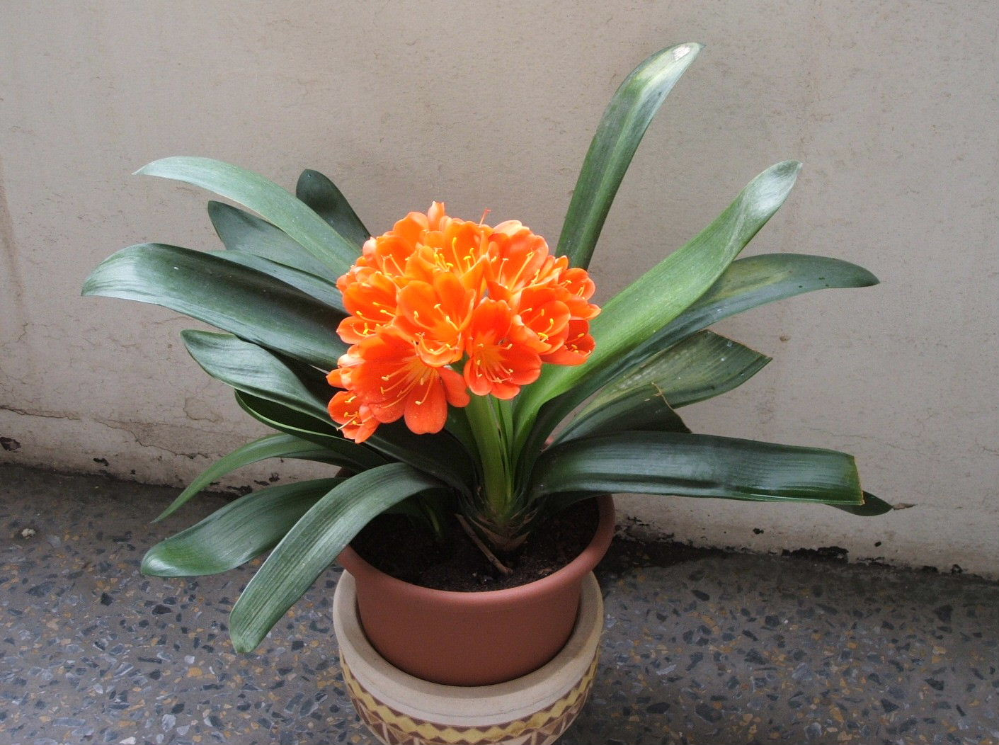 Clivia orange